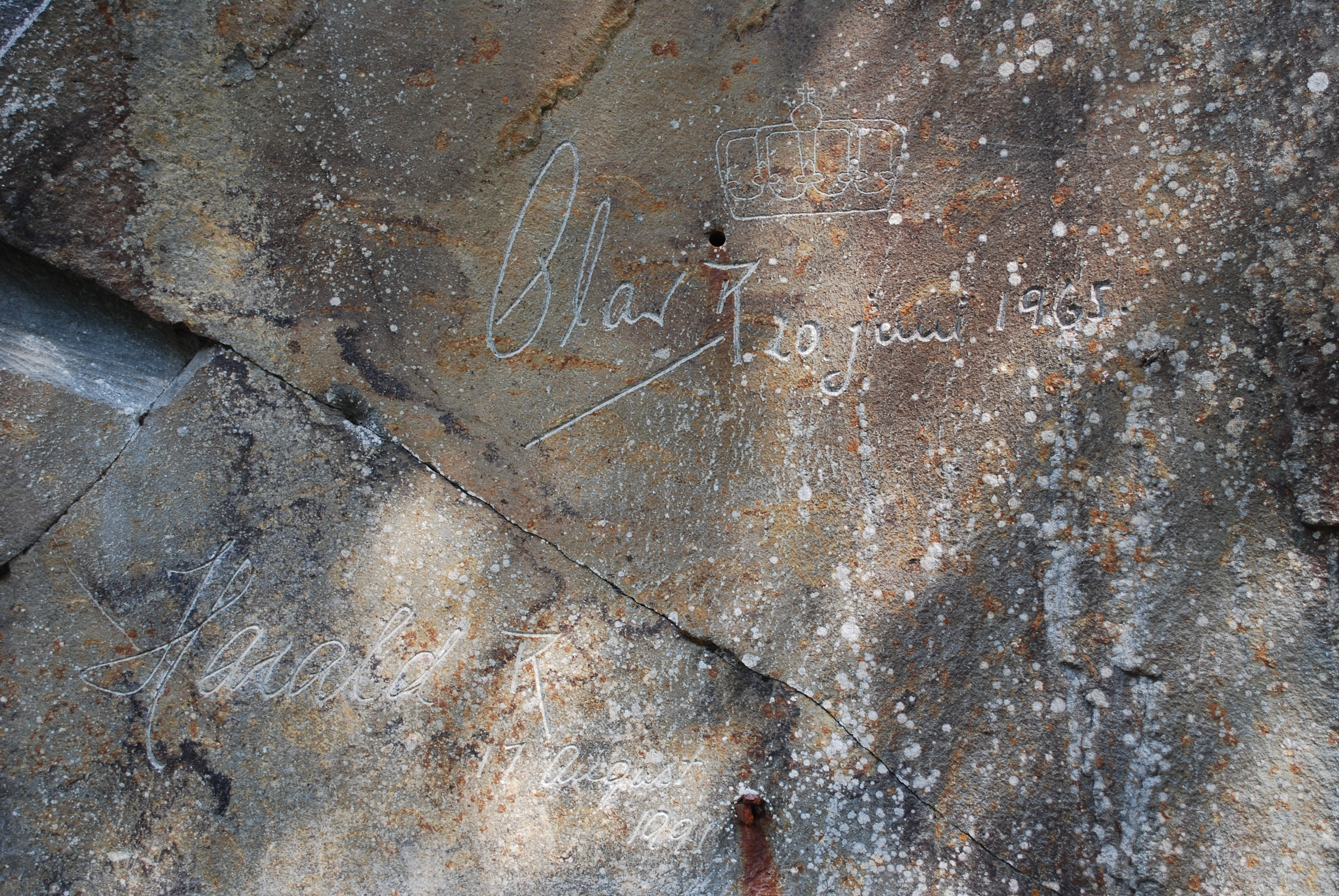 Kongelige signaturer på Hegra festning, fra kong Olav (1965) og kong Harald (1991).